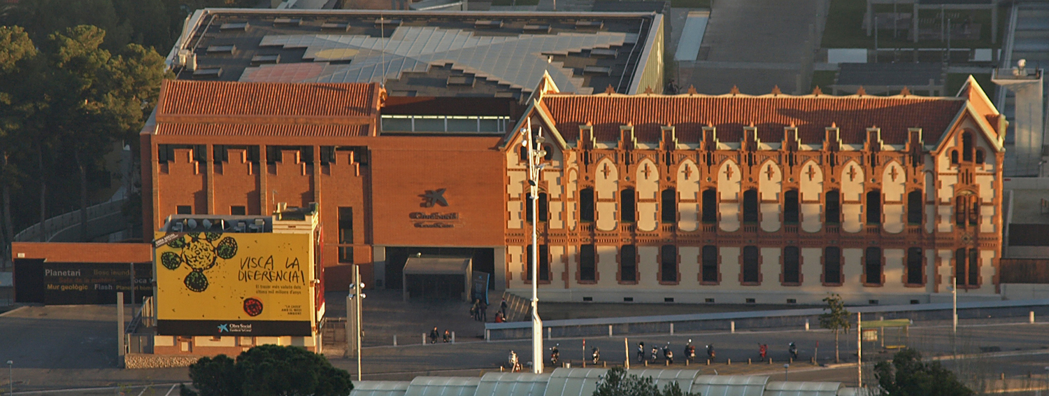 CosmoCaixa (Barcelona, Spain)